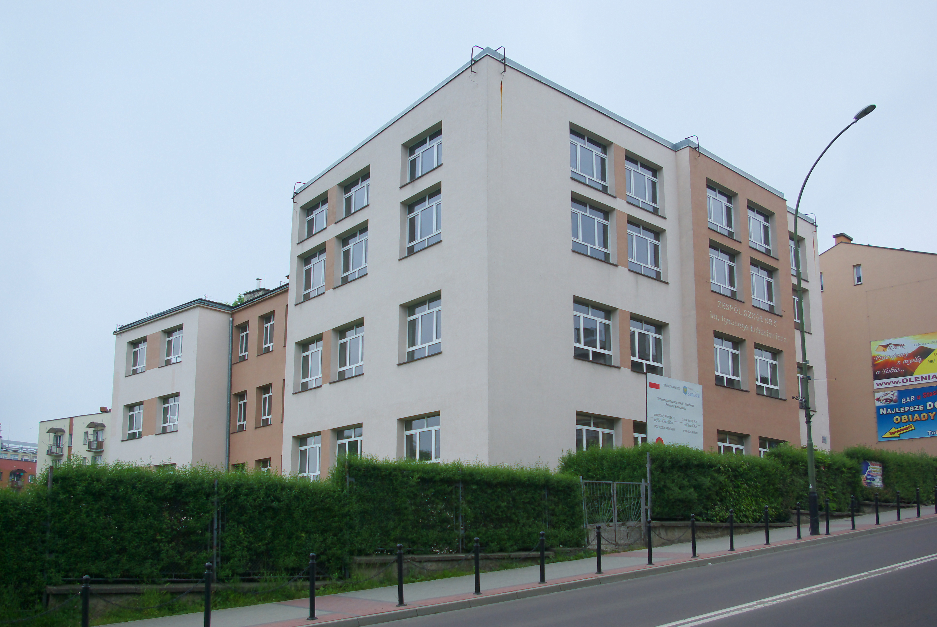 Budynek przy ul. Jagiellońskiej 22 w Sanoku (2016).